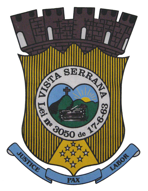 Brasão do município de Vista Serrana